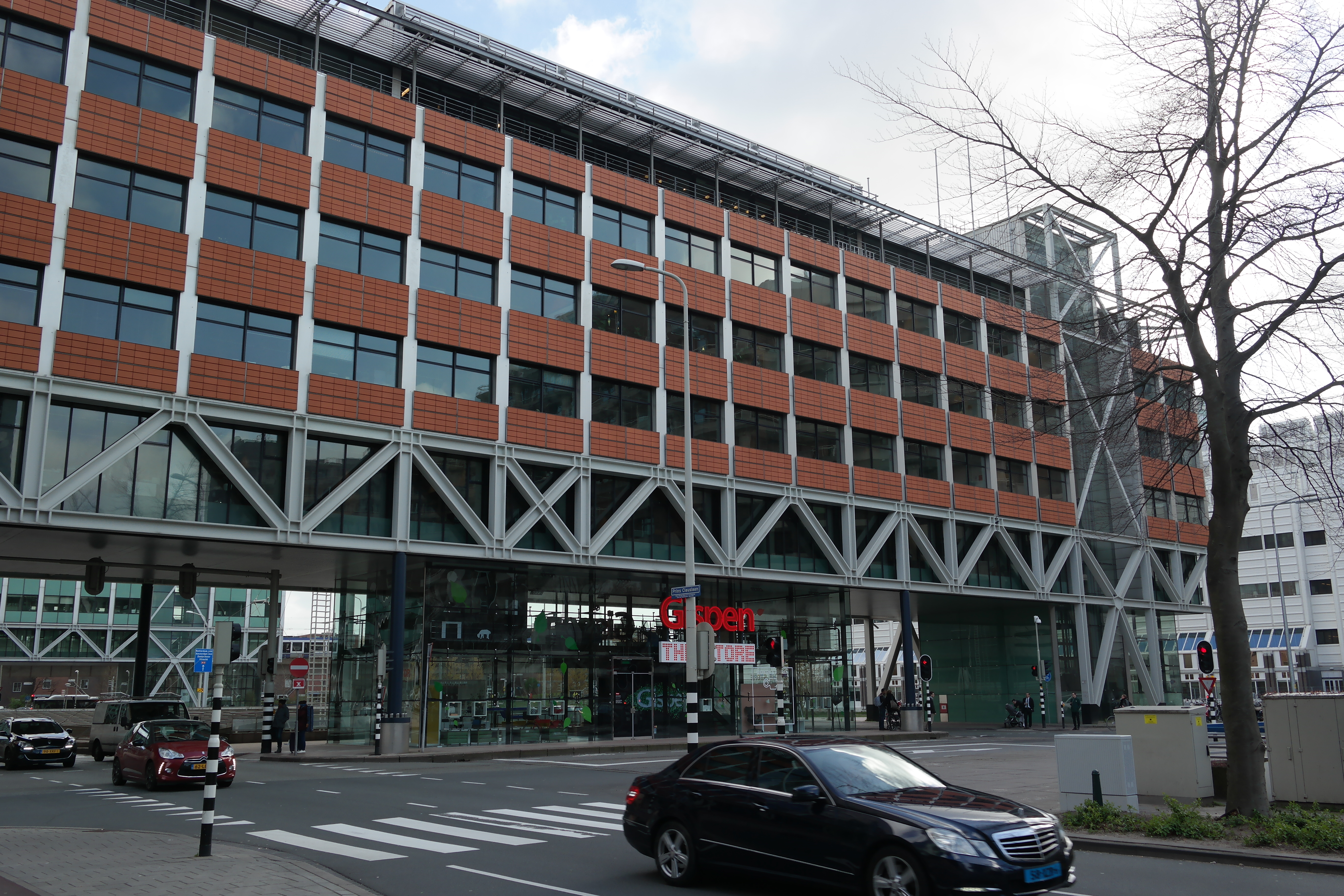 De Prins Clauslaan in Den Haag. Bruggebouw West.